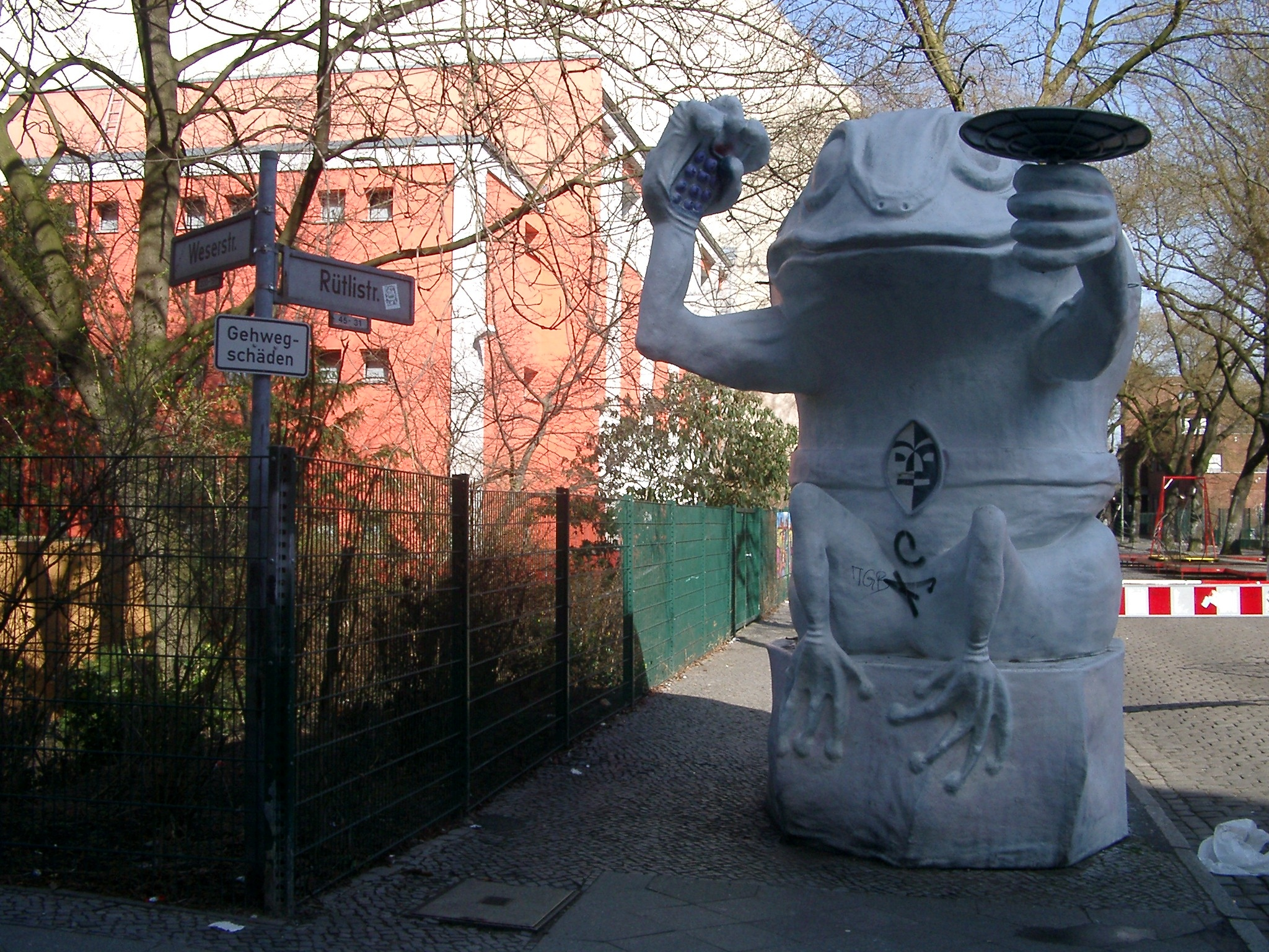 entrance to Rütli-Street in Berlin-Neukölln